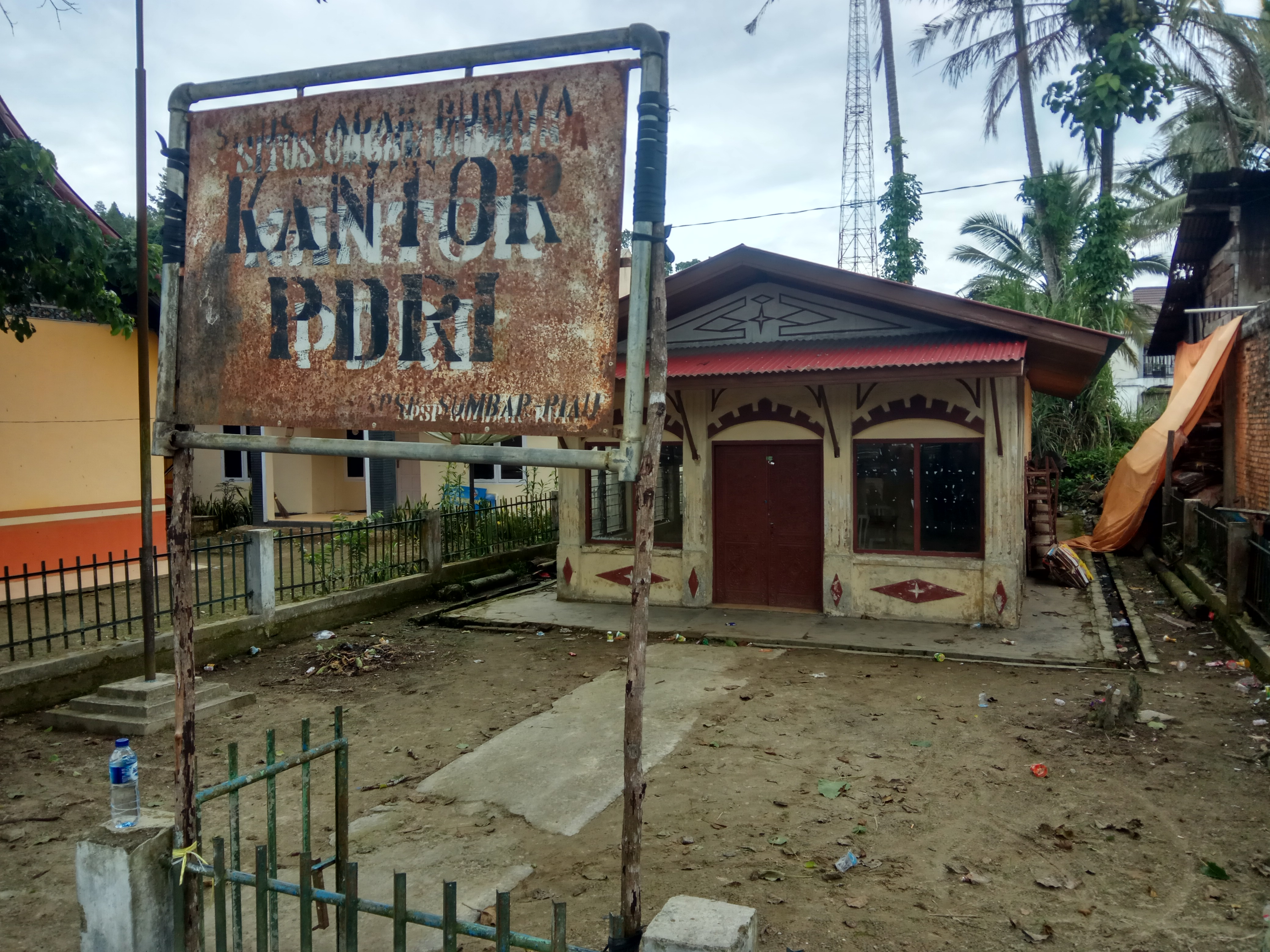 Kantor PDRI yang terletak di area Pasar Koto Tinggi, Gunuang Omeh, Lima Puluh Kota, Sumatra Barat.